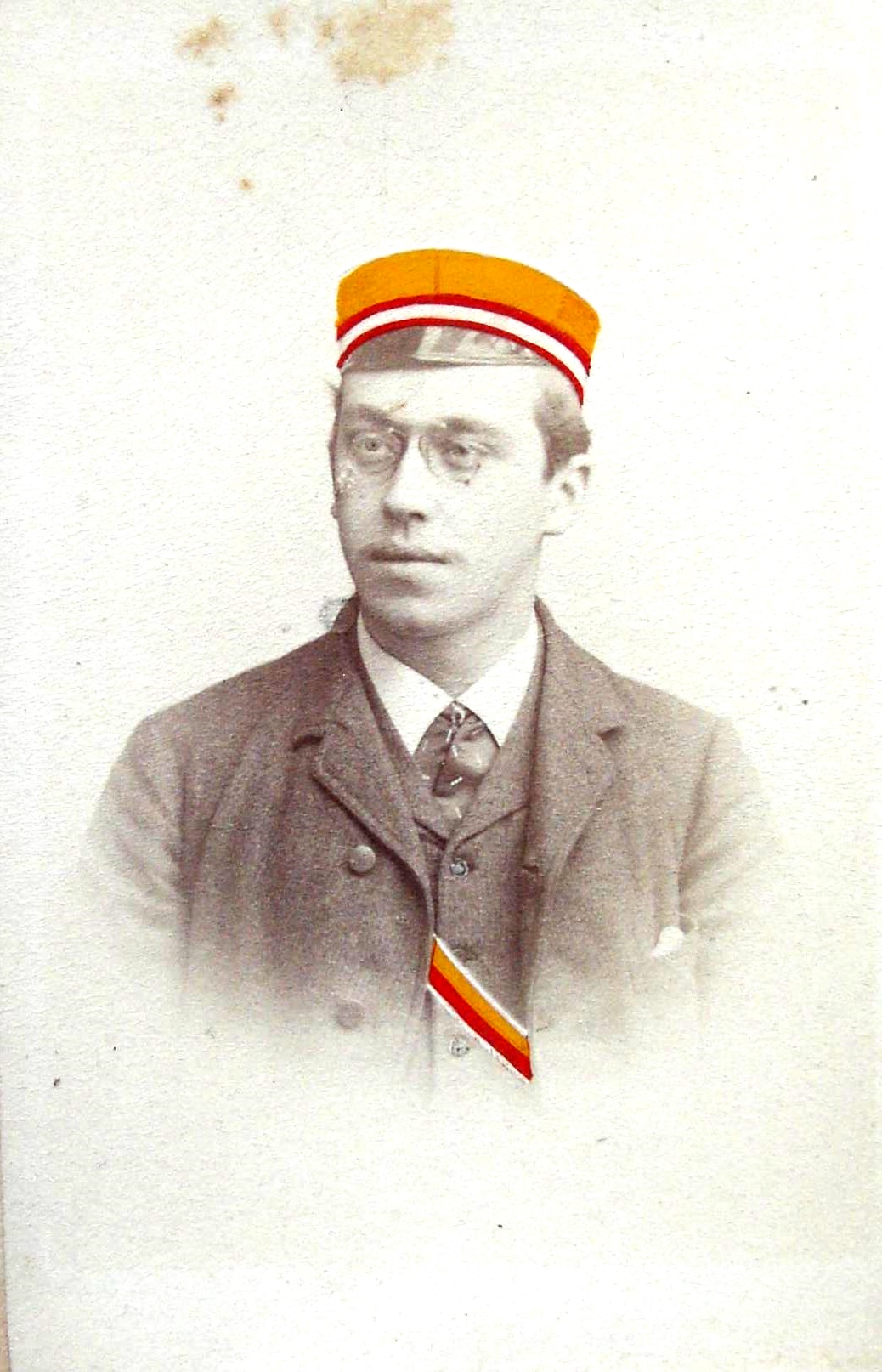 Porträtfotografie von Rudolf Joerges